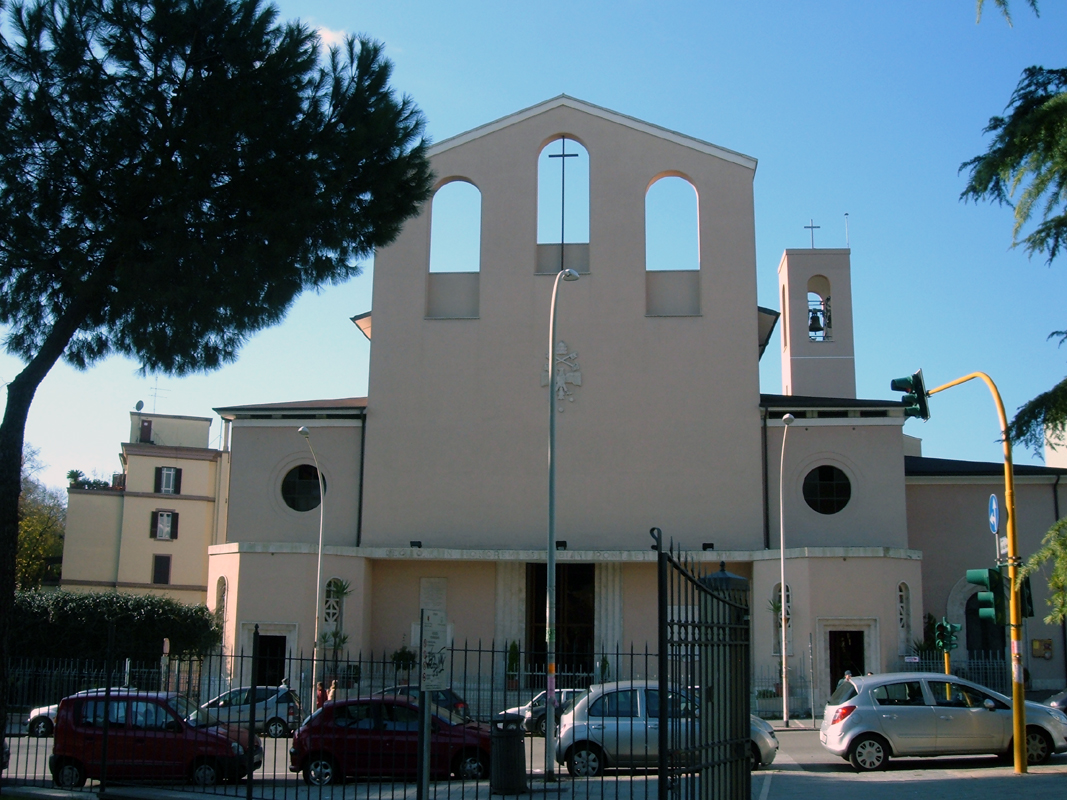 Chiesa dei Santi Fabiano e Venanzio, a Roma, nel quartiere Tuscolano.